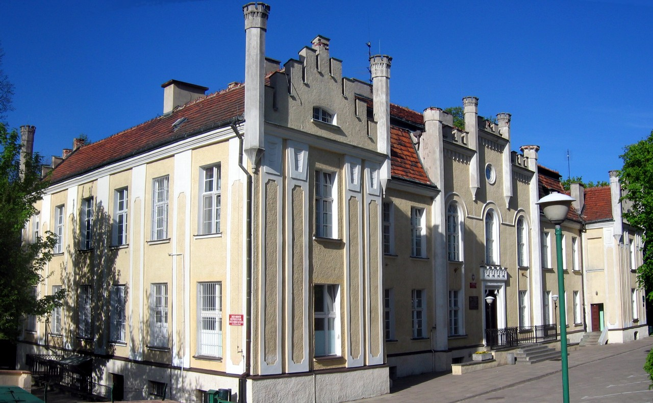 Dawny dwór w Małym Kacku (następnie do 2007/08 I Liceum Akademickie w Gdyni)